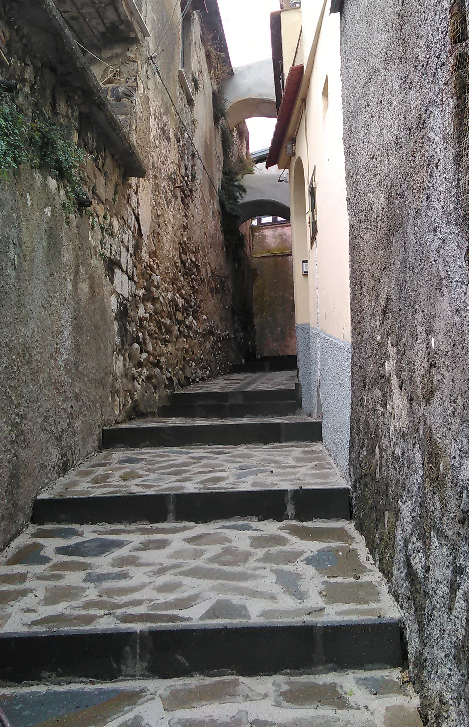 Stradina del borgo medievale di Santa Caterina